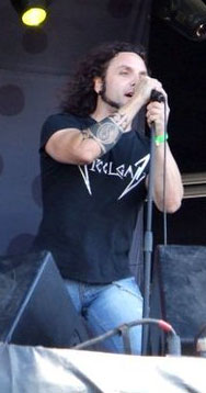 Avalanch en el Festival En Vivo 2010.